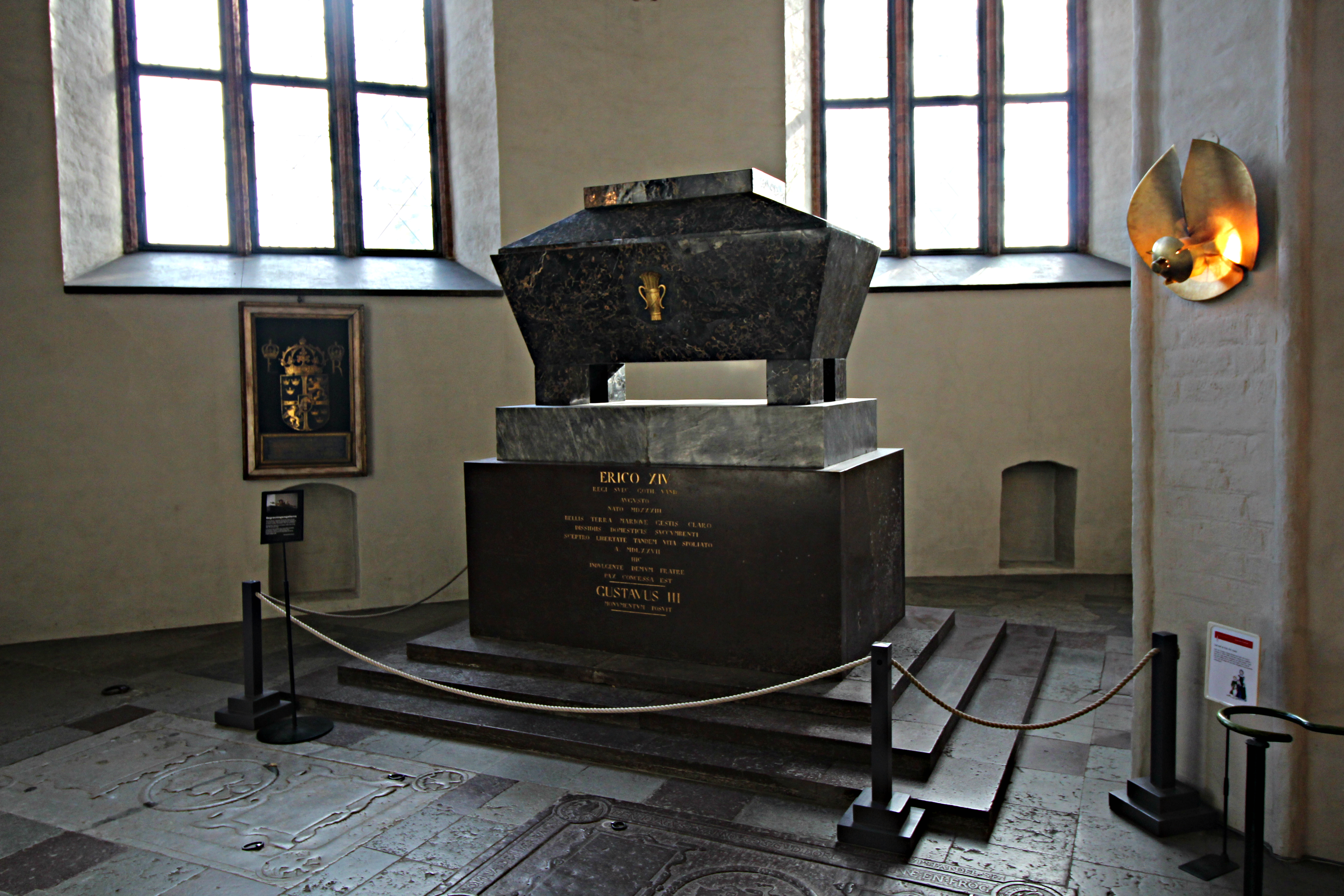 Erik XIV gravkista i Västerås domkyrka